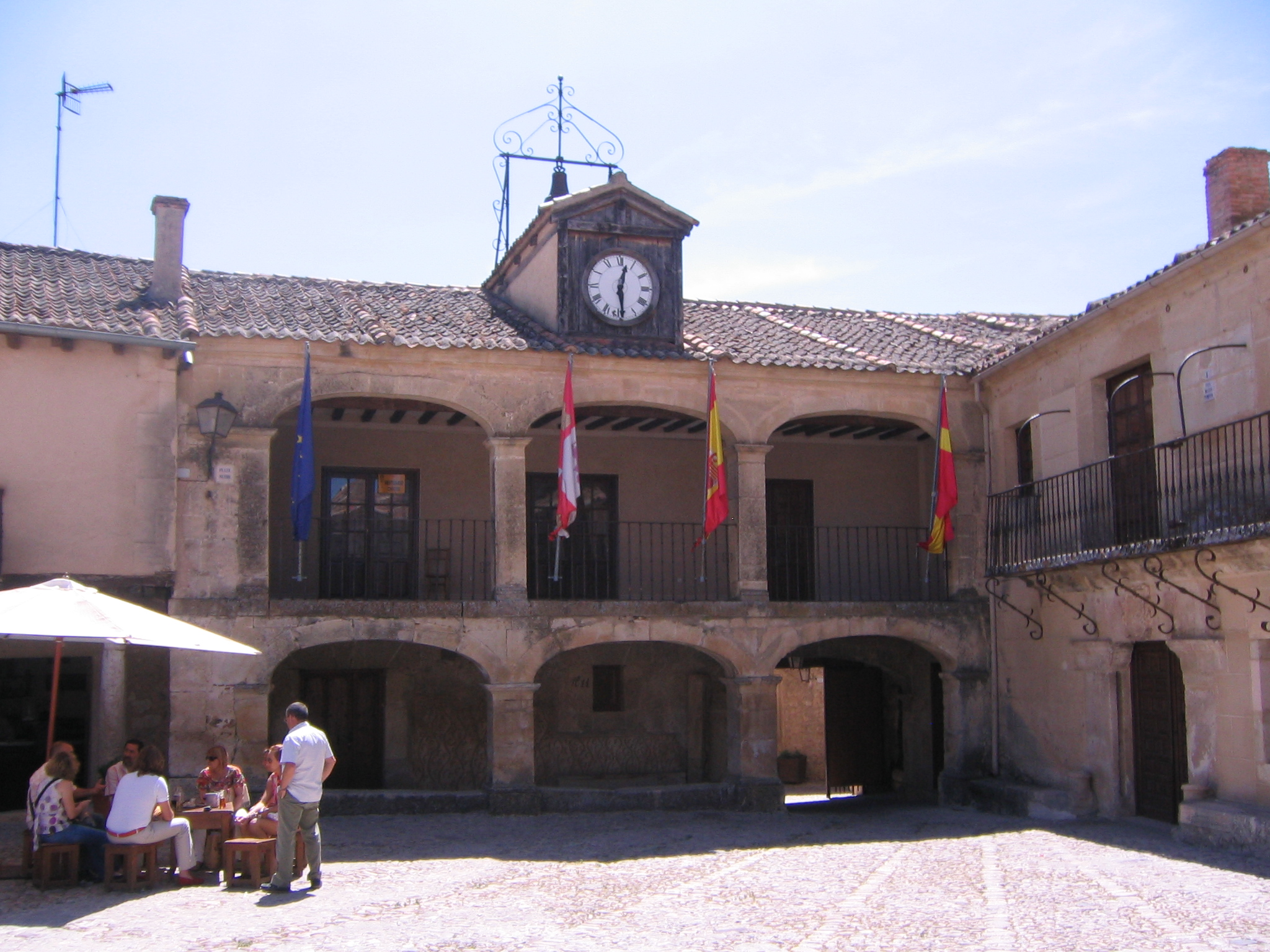 Casa consistorial de Pedraza, Segovia (Castilla y León) España.